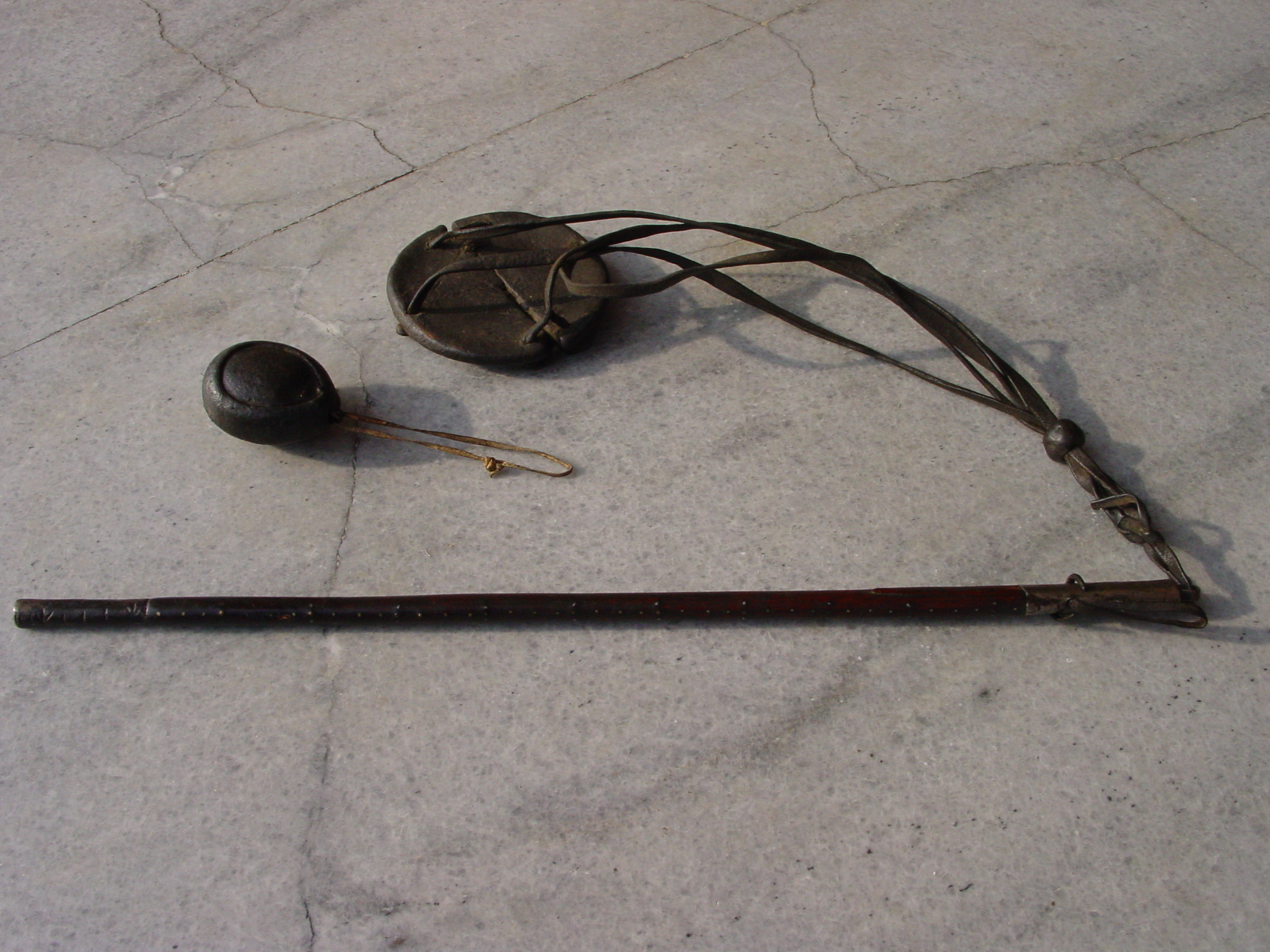 tibetische Waage